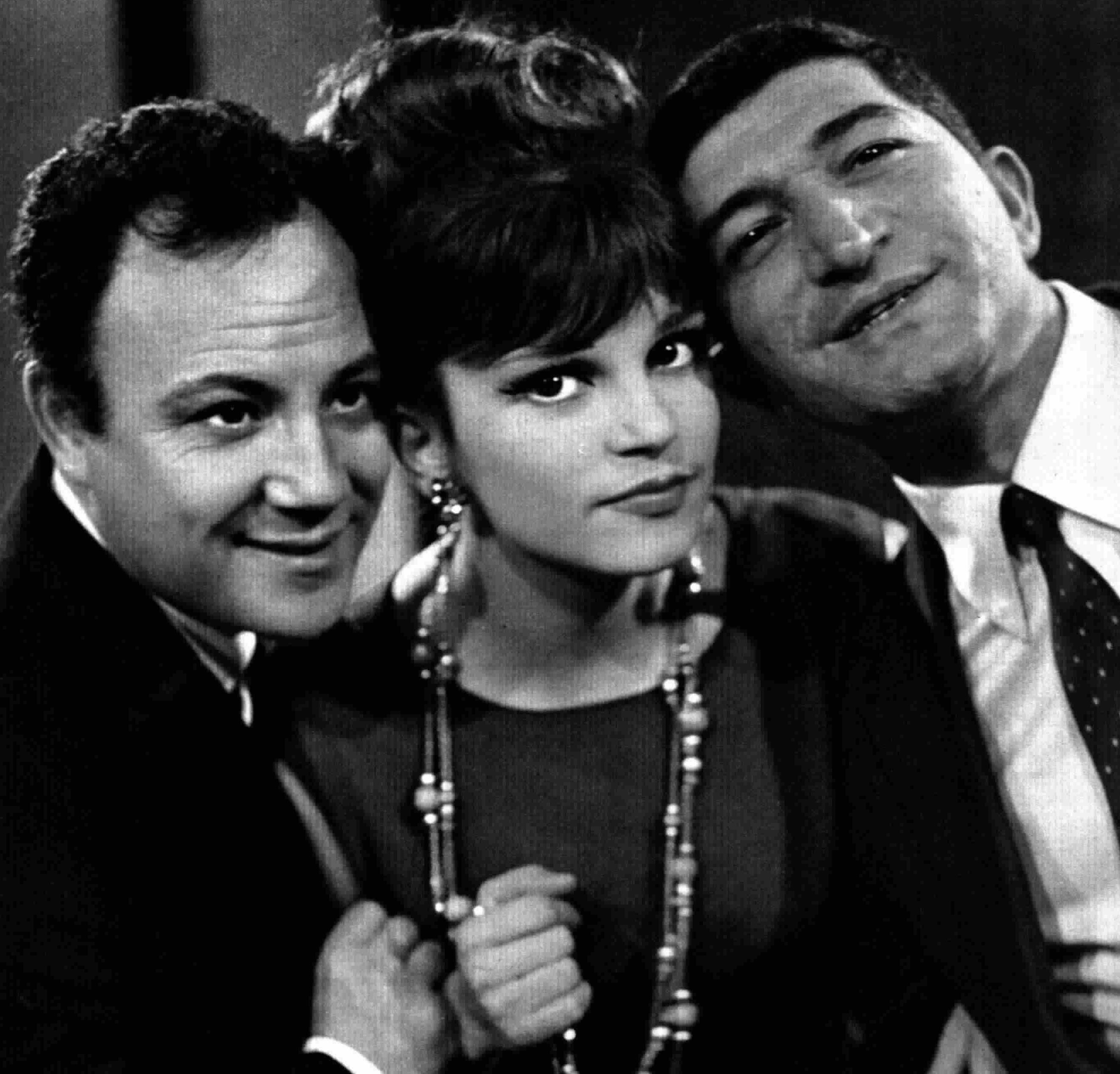 Italian singers Claudio Villa, Milva and Nicola Arigliano